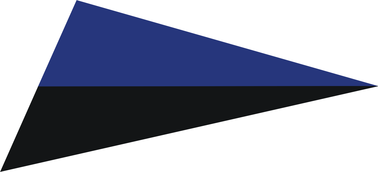 LWP - barwy broni na kołnierze kurtek obowiązujące od stycznia 1945 - wojska łączności